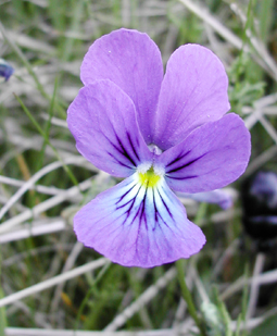 violette France juin 2003